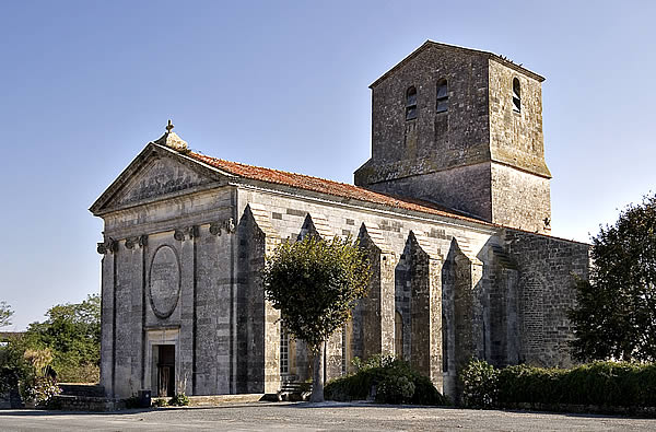 Église de Soubise - Charente-Maritime Photo issue de ma banque d'images : Pep.per 13 octobre 2006 à 22:16 (CEST)